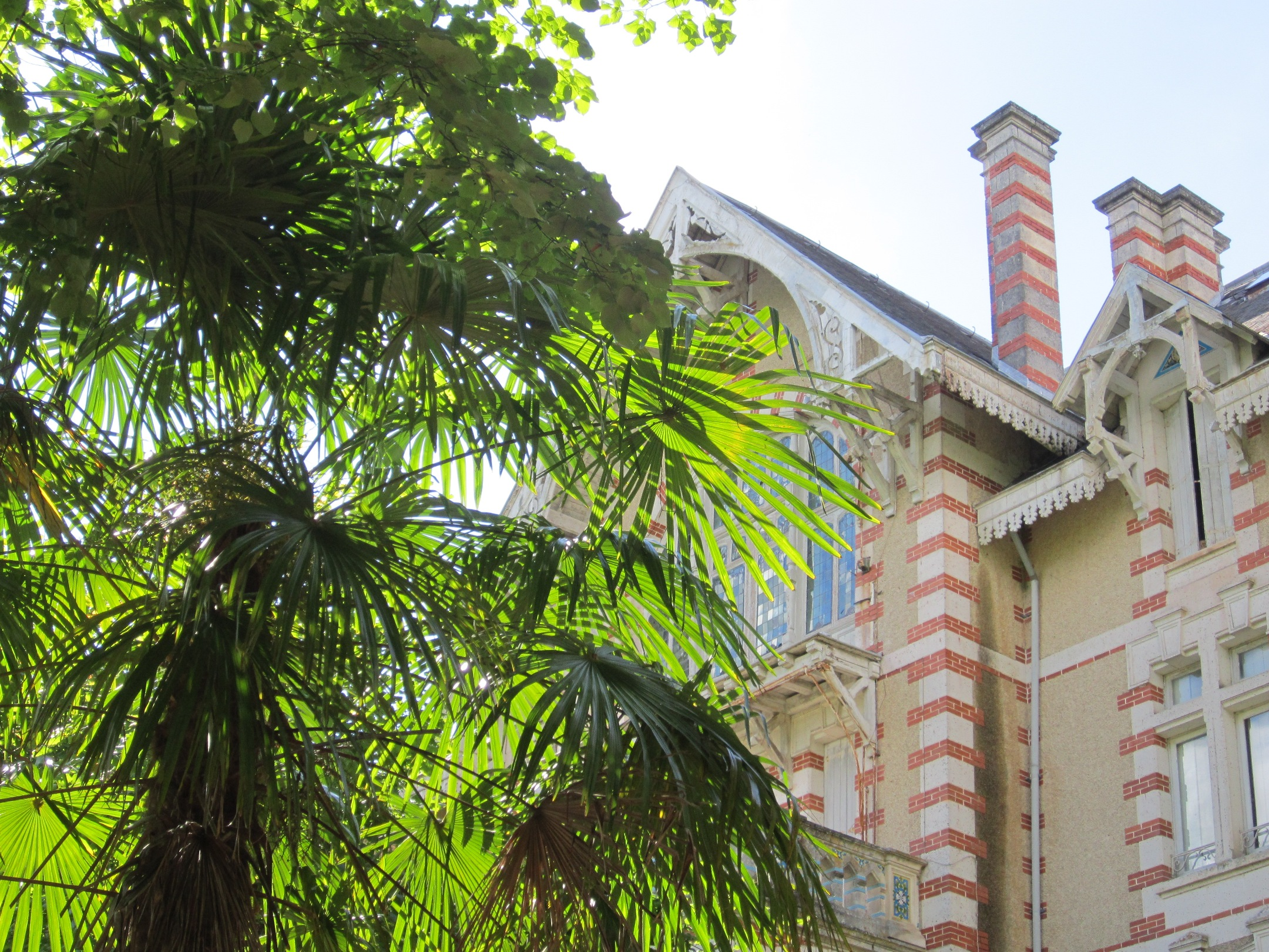 Château construit à la fin du XIXe siècle, pour un associé de la maison de cognac Dubois Frères & Cagnion, et conseiller général de Blanzac.